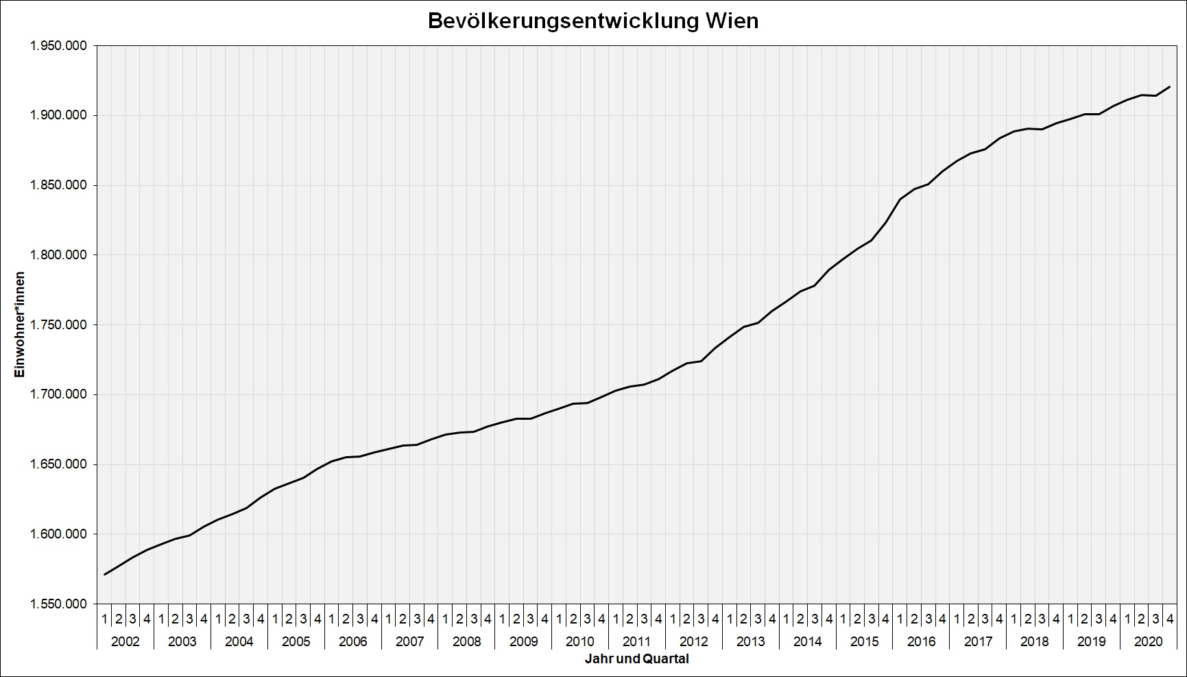 Bevölkerungsetwicklung in Wien ab 2002